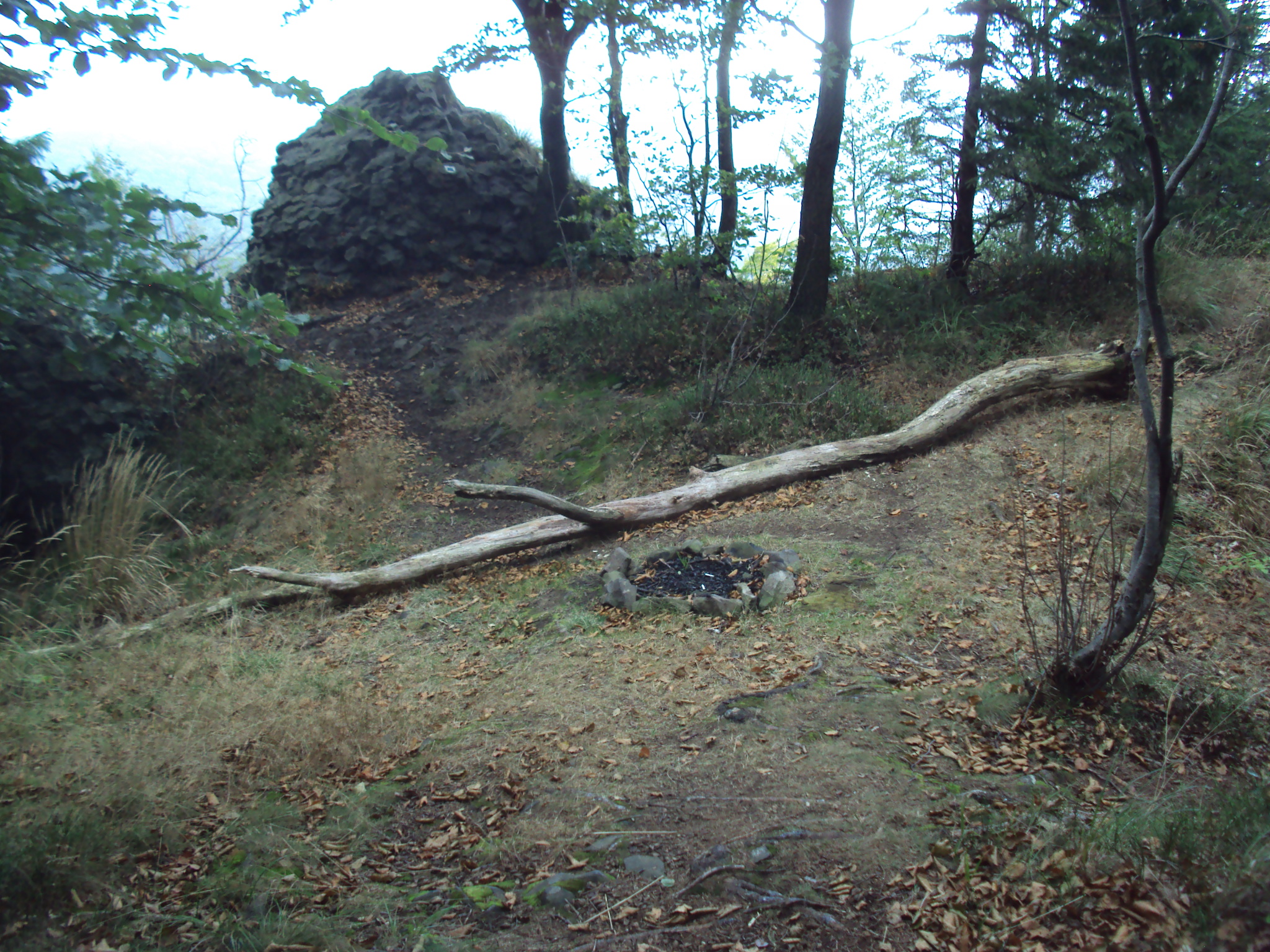 Pohled na vrcholovou planinku České skály